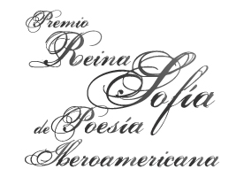 Premio Reina Sofía de Poesía Iberoamericana